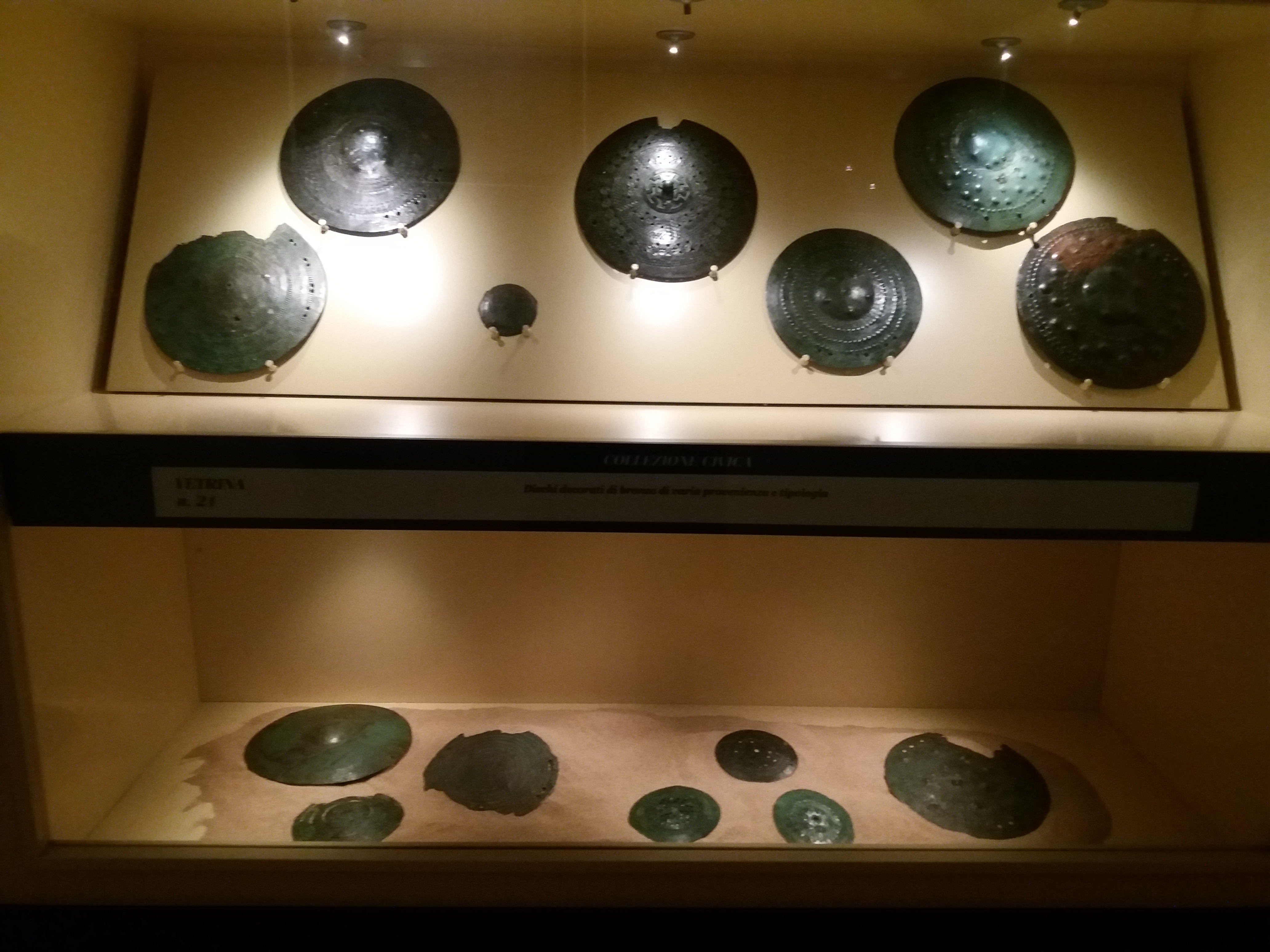 Sulmona: Museo civico